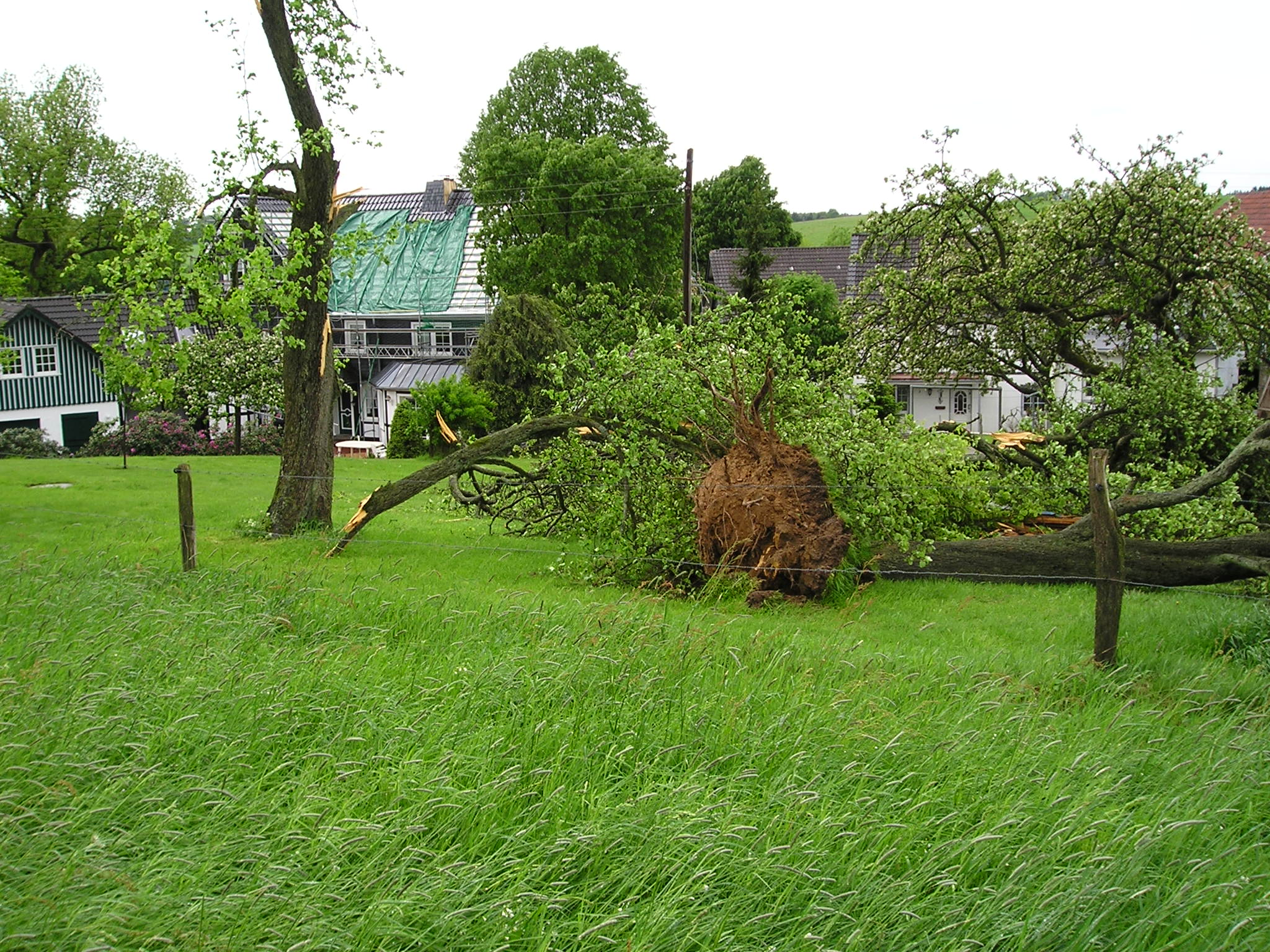 Sturmschäden durch die Windhose am 20.05.2006 in Peppinghausen